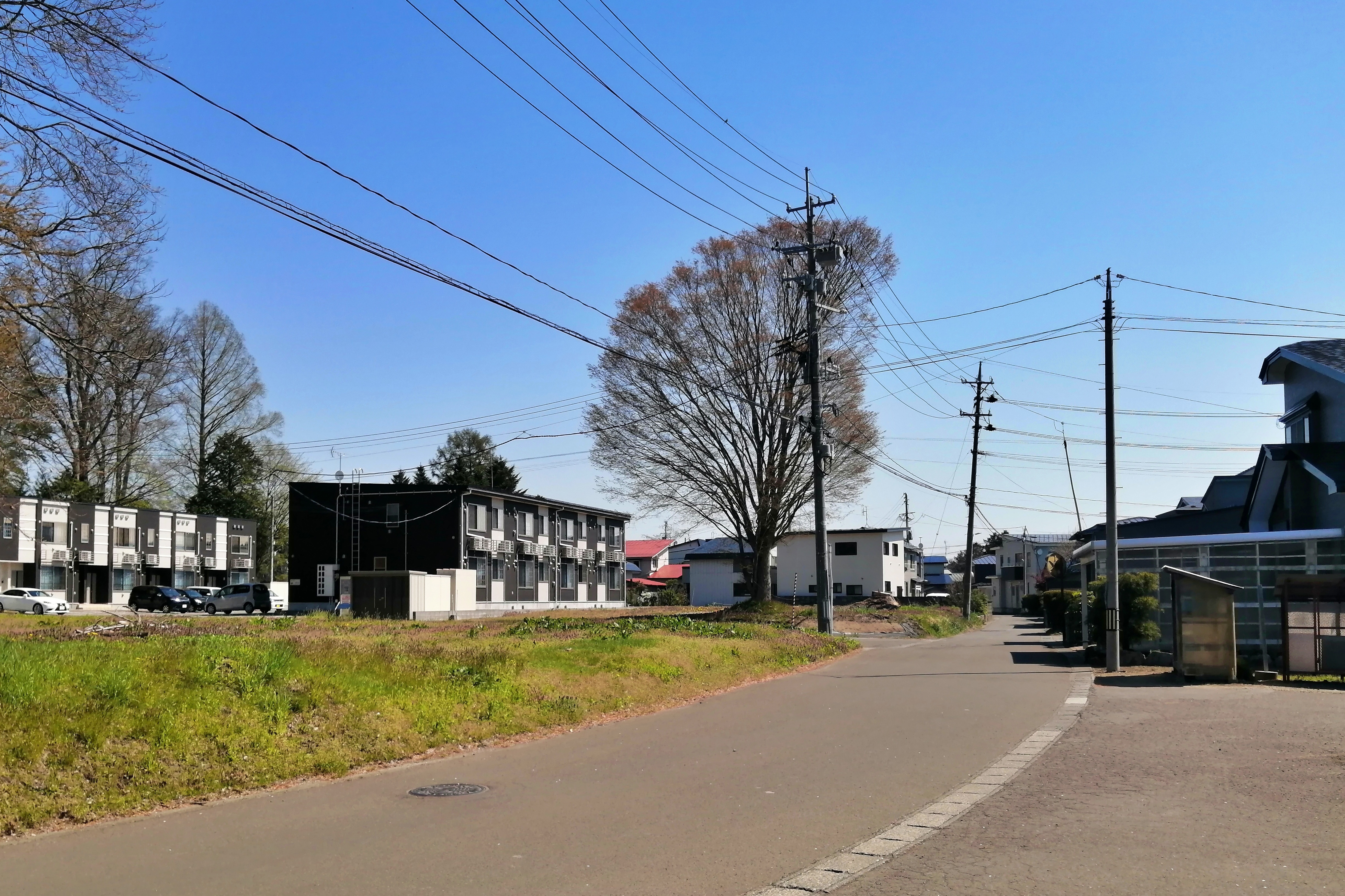 北秋田市伊勢町